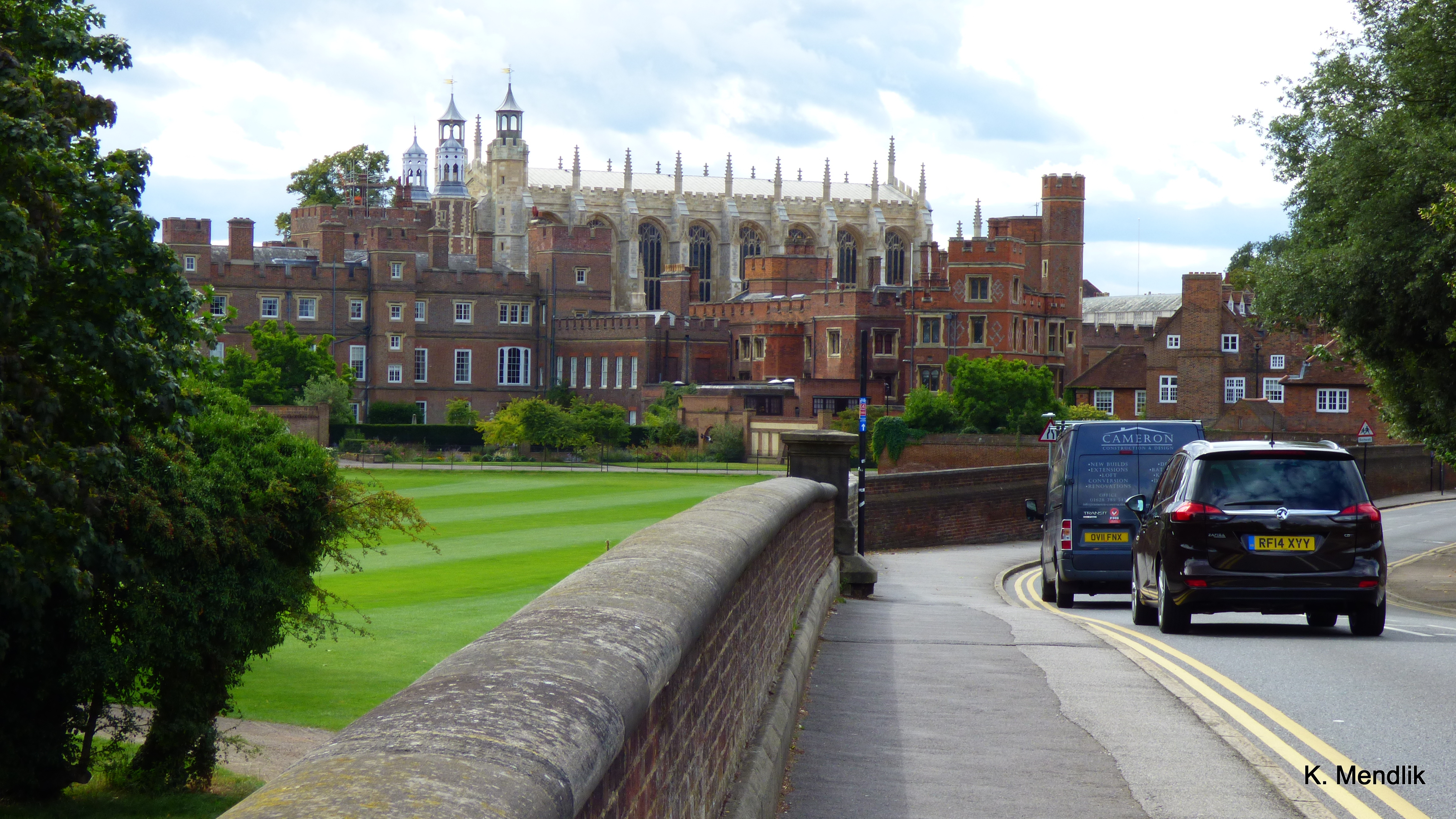 . Widok z ulicy - Eton College